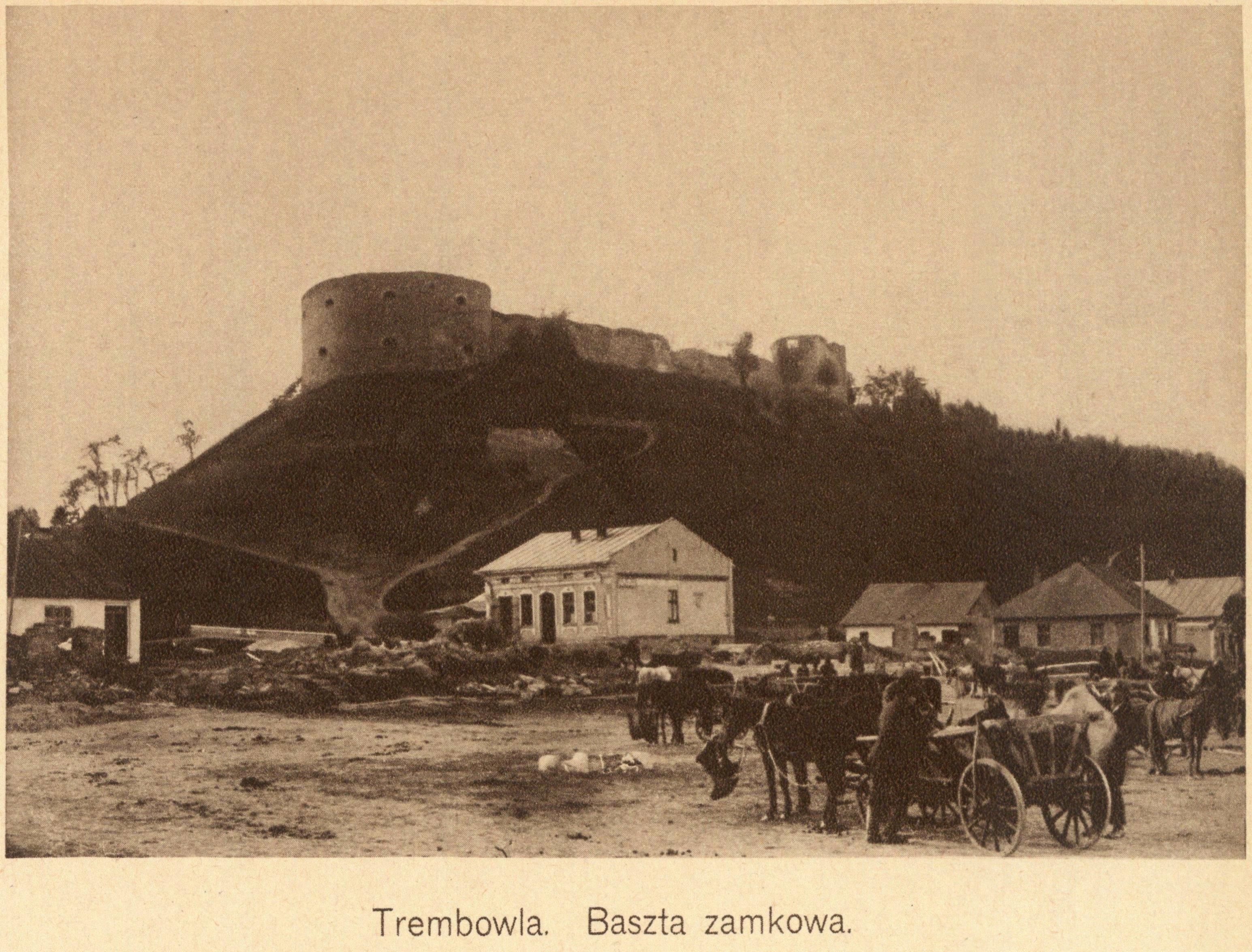 Вид на Замкову гору в Теребовлі.